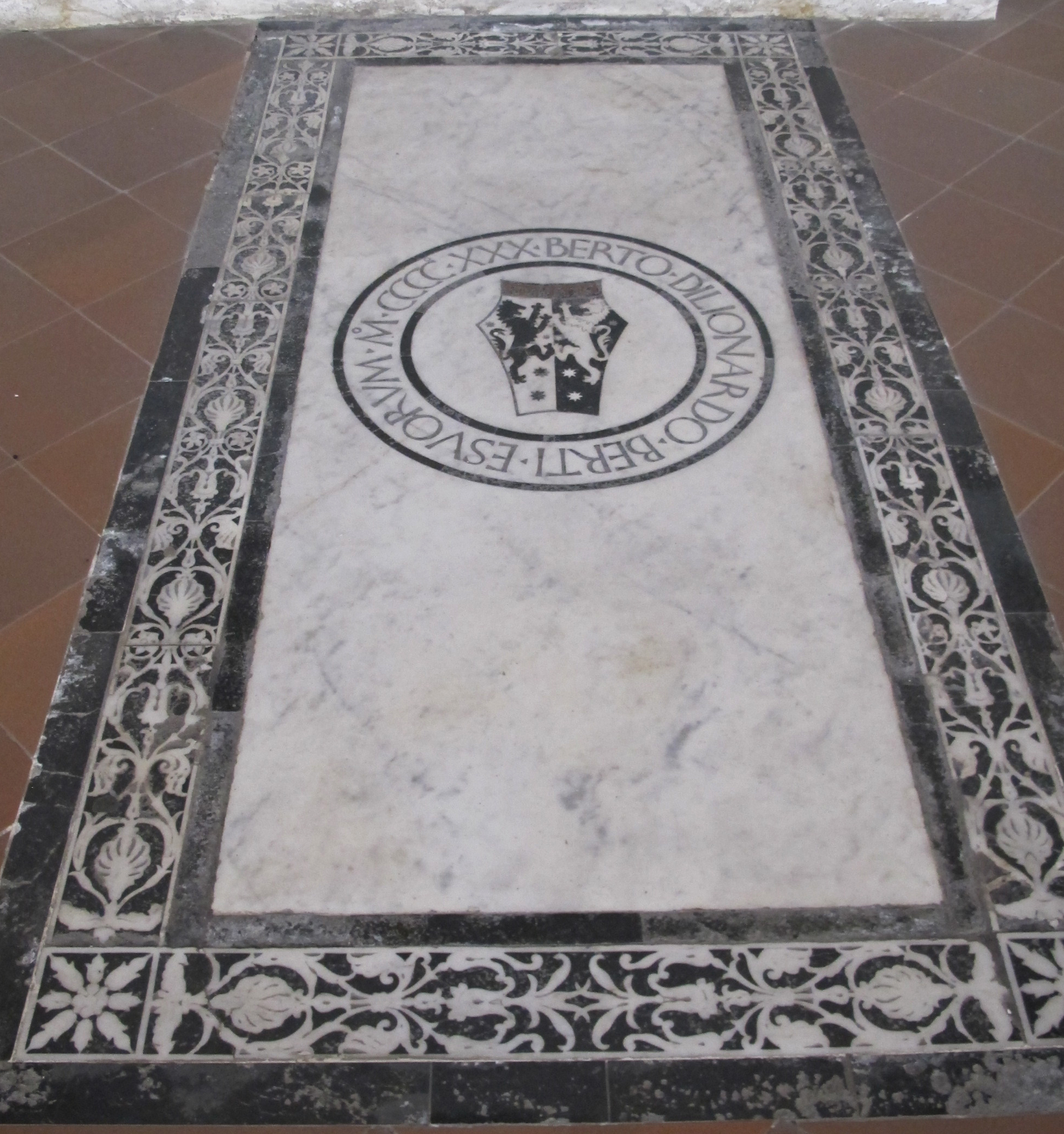 S. croce, tomba sul pavimento 14 berti